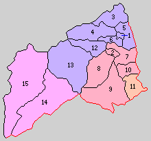 岩手県二戸郡の町村。